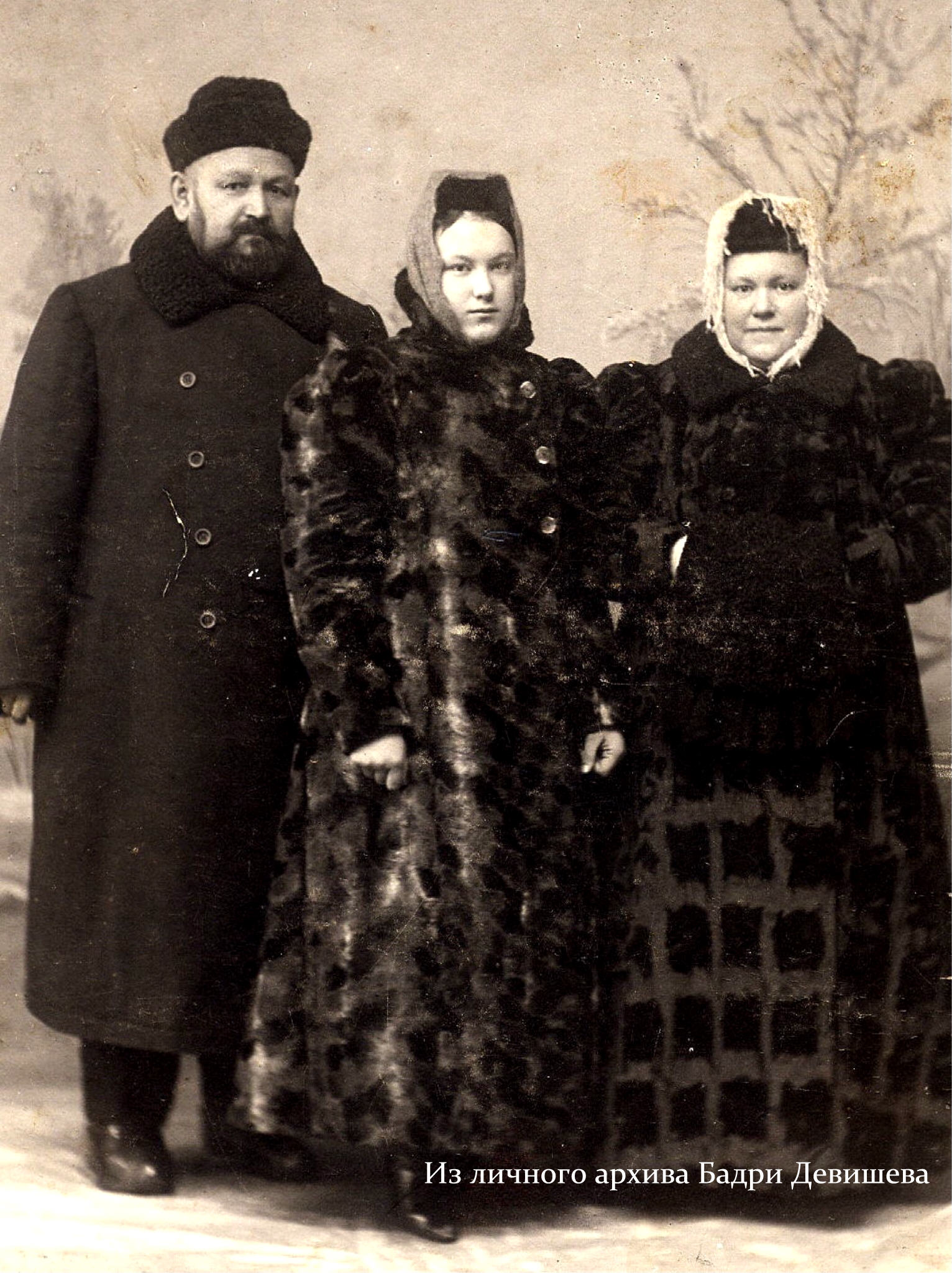 Хисаметдин Гафурович Агафуров с женой Биби Азизой и дочерью Марфугой